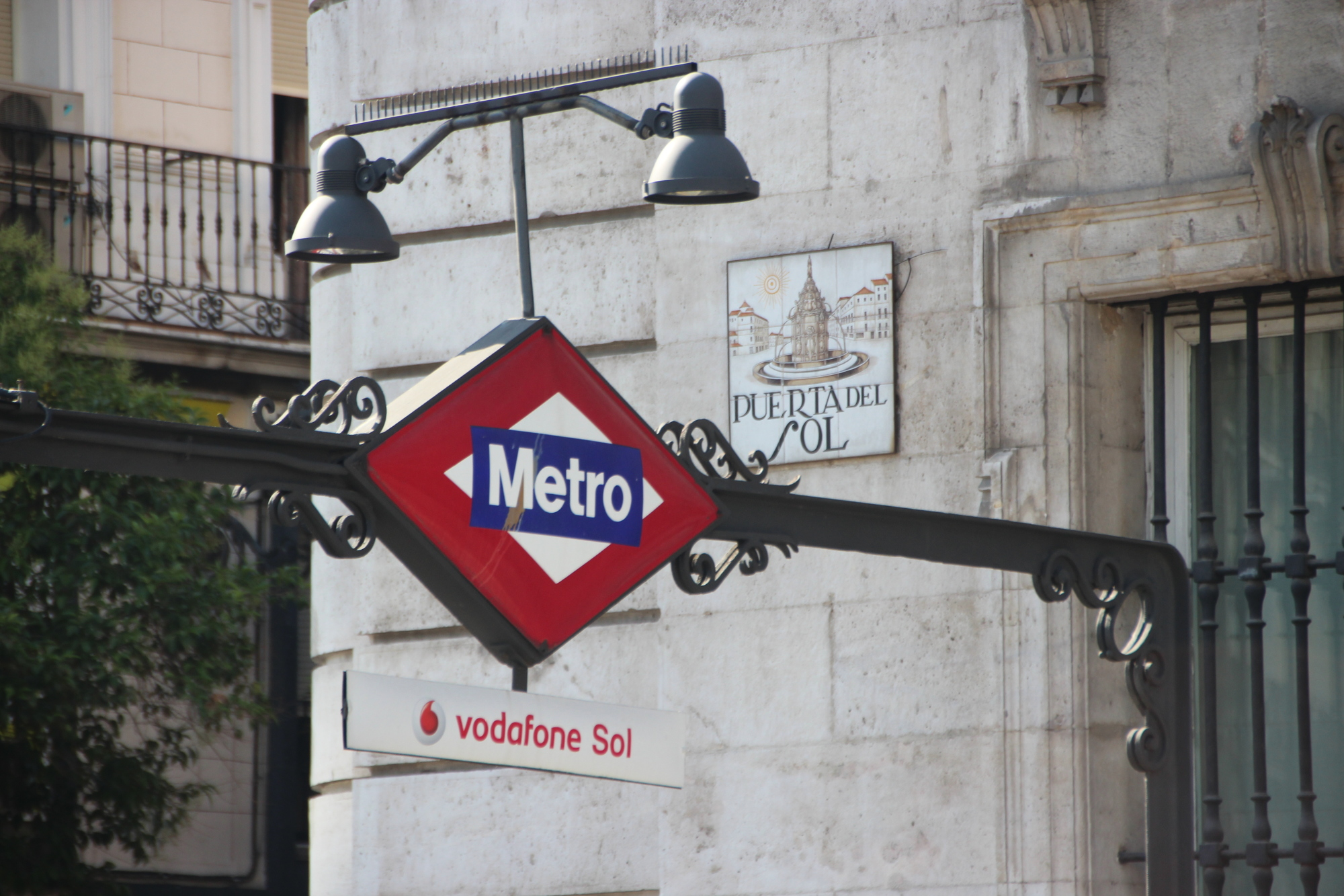 Schild der Metro-Station "Vodafone Sol" auf dem Platz "Puerta del Sol" in Madrid, Spanien